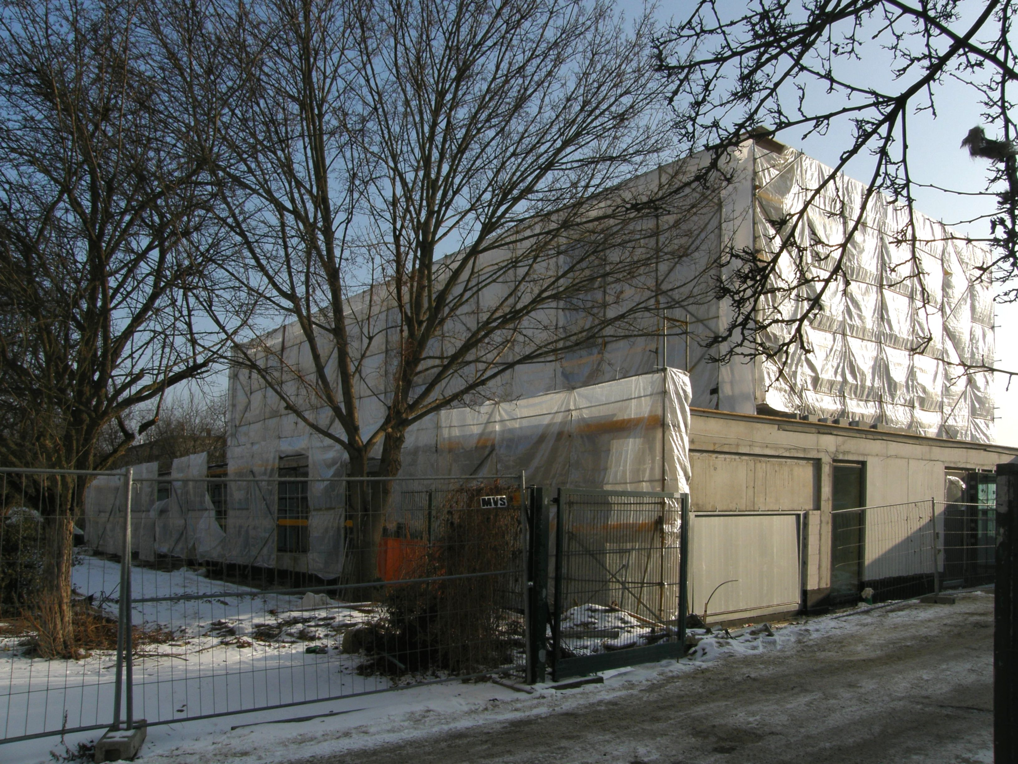 Berlin-Prenzlauer Berg, Gubitzstraße: Staatliche Ballettschule